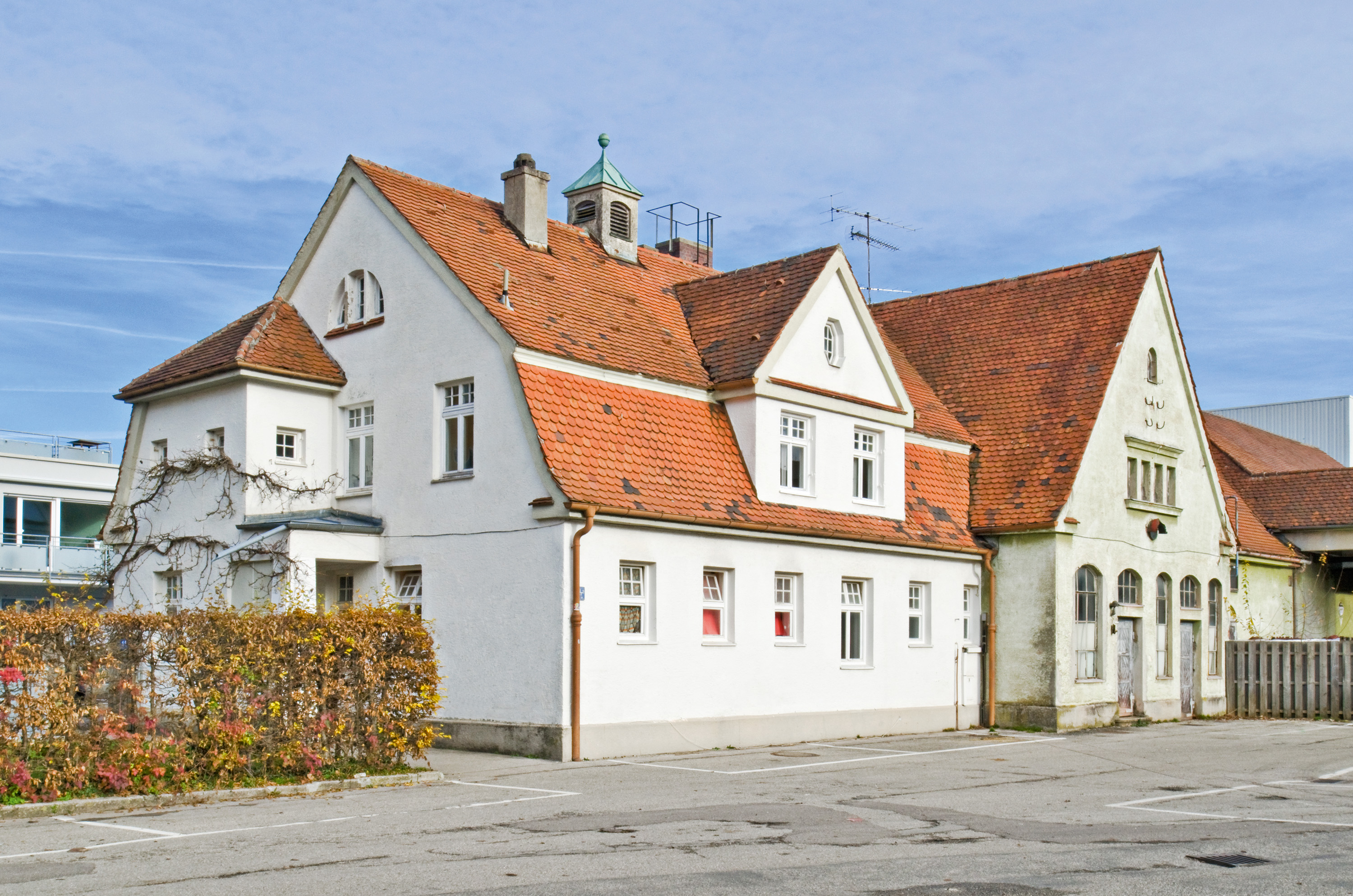 Alte Warmbadanlage, zusammen mit dem ehemaligen Schlachthof 1911 eröffnet.This is a photograph of an architectural monument.